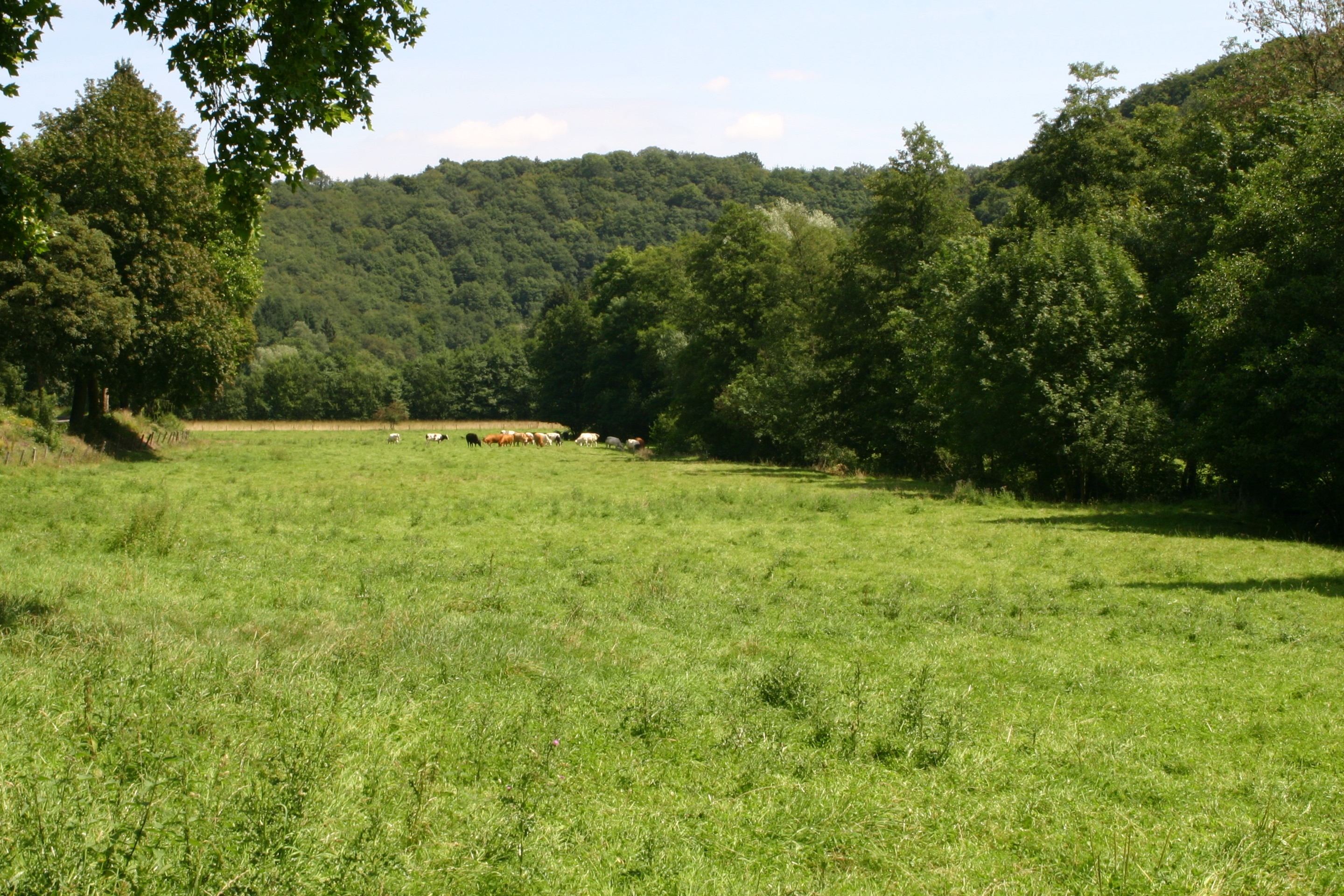 Den Dall vum Néblon tëscht Hamoir an Ouffert. Kategorie:Baachen an der Belsch